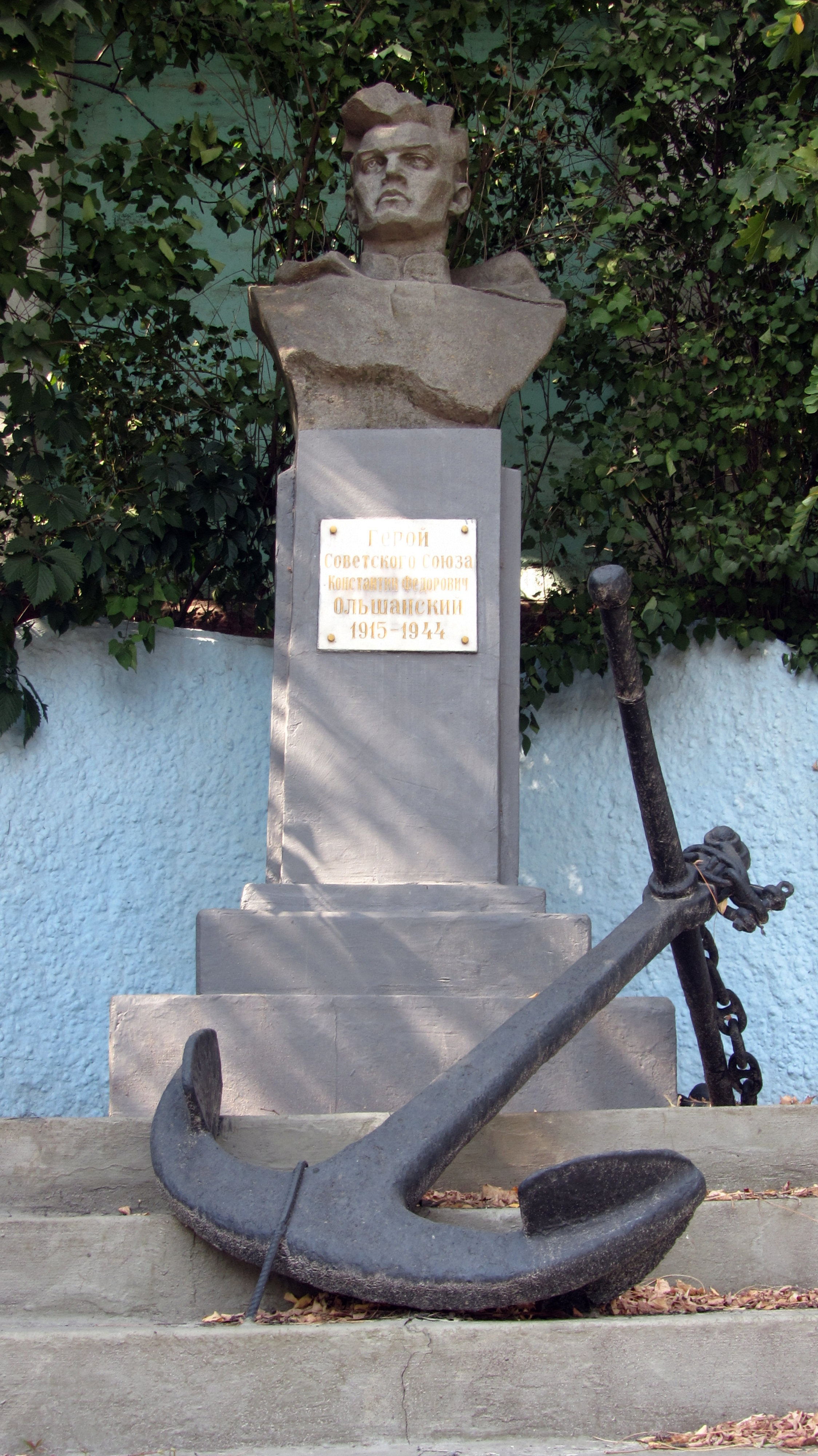 Бюст Героя Радянського Союзу К. Ф. Ольшанського (Автори: скульптор О.О. Здіховський, архітектор В.В. Пластіков ), Миколаїв, територія Миколаївського морського торговельного порту